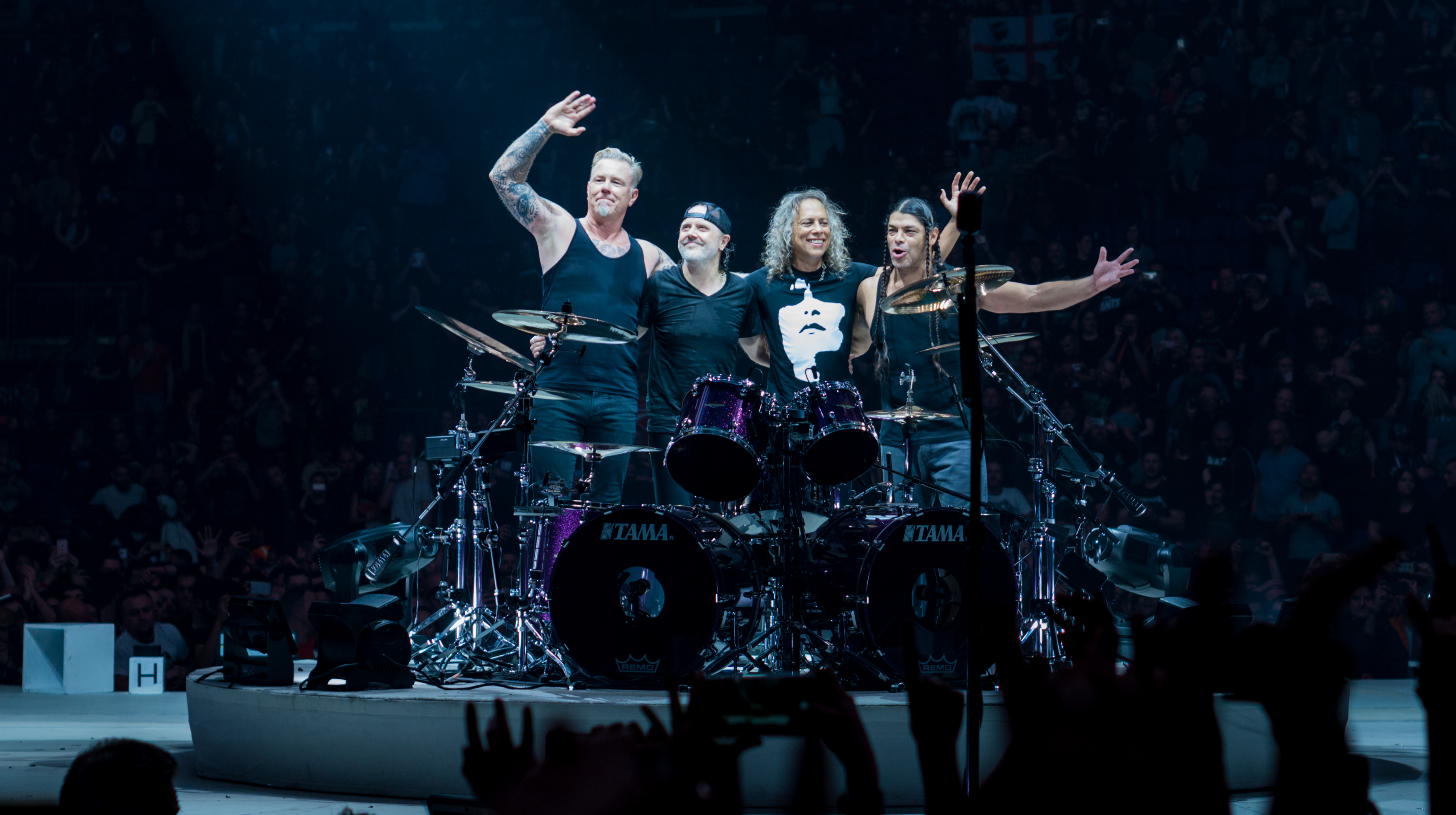 MetallicaO2221017-107